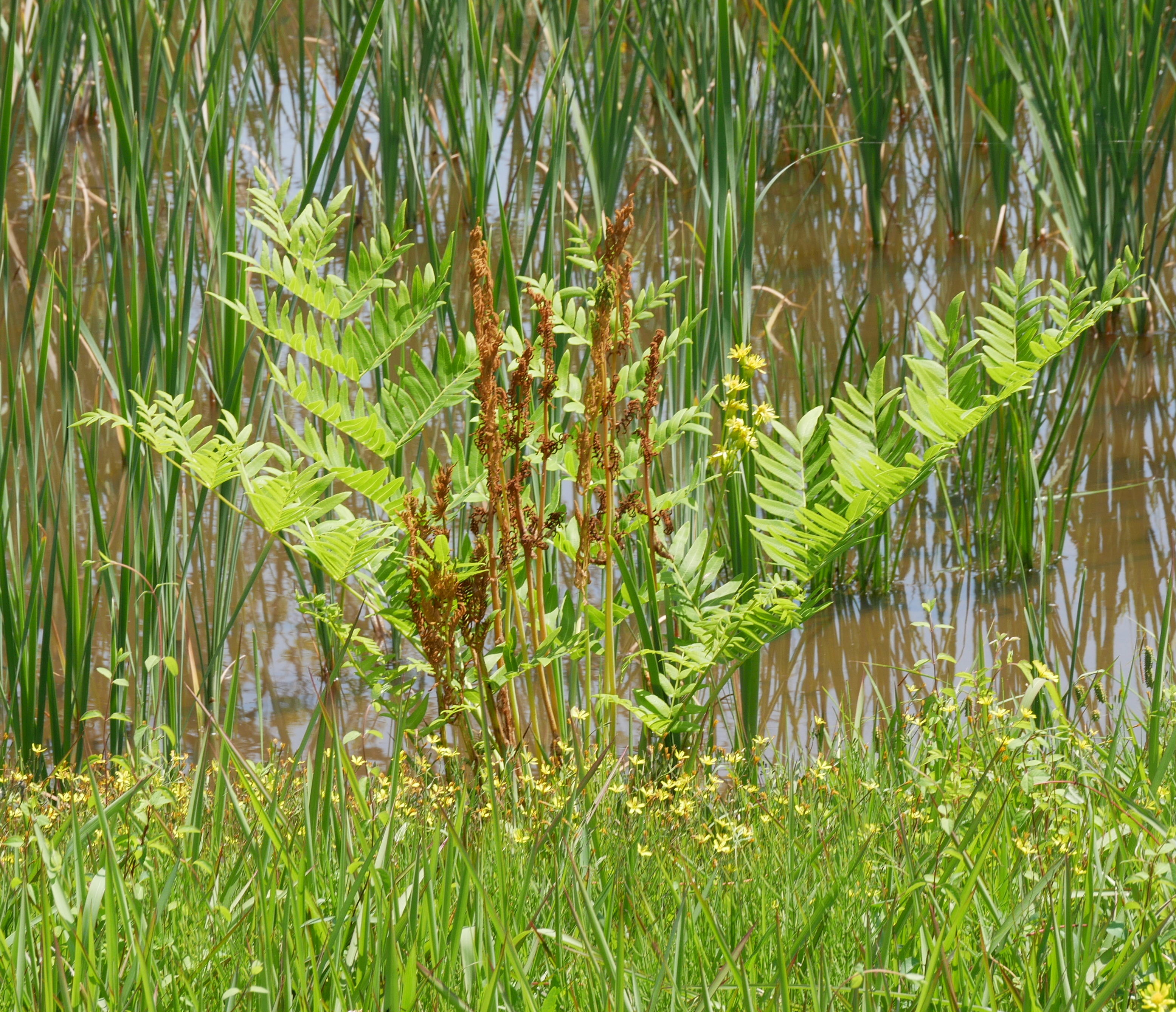 2019/04/21 宮崎県高鍋東部湿:Miyazaki Pref. Japan